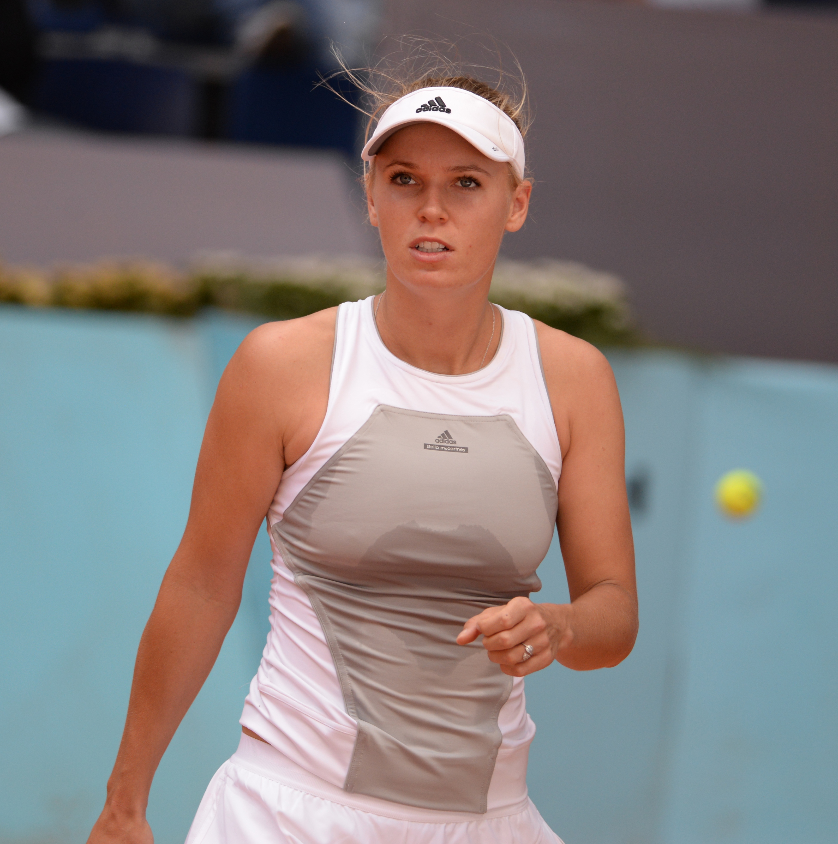 Caroline Wozniacki